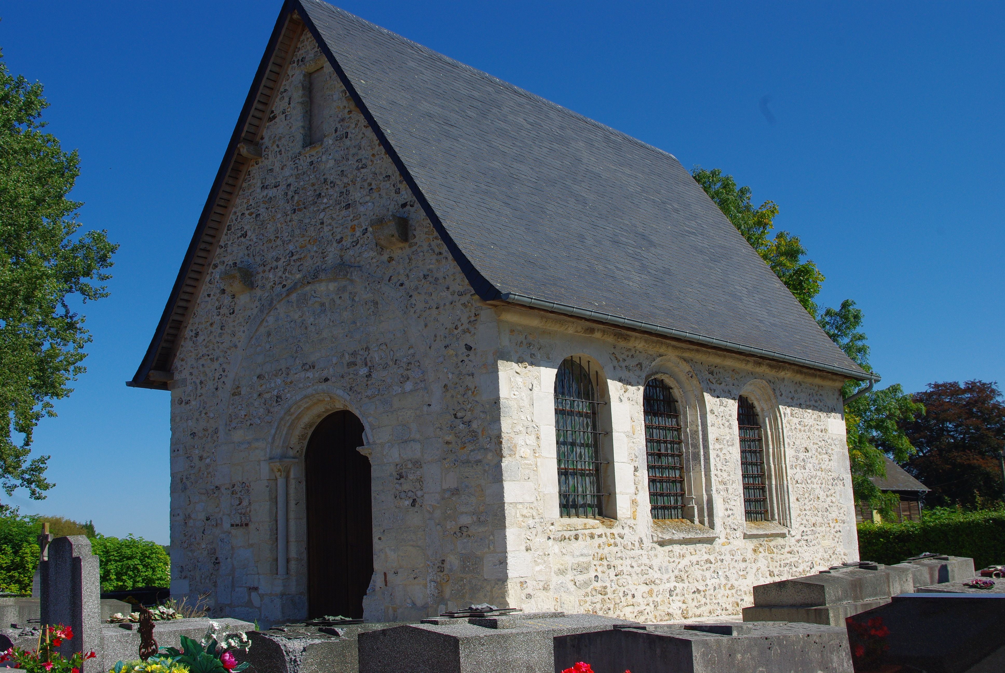 Chapelle du Fay, à Sainte-Marie-des-Champs (Seine-Maritime, France) .